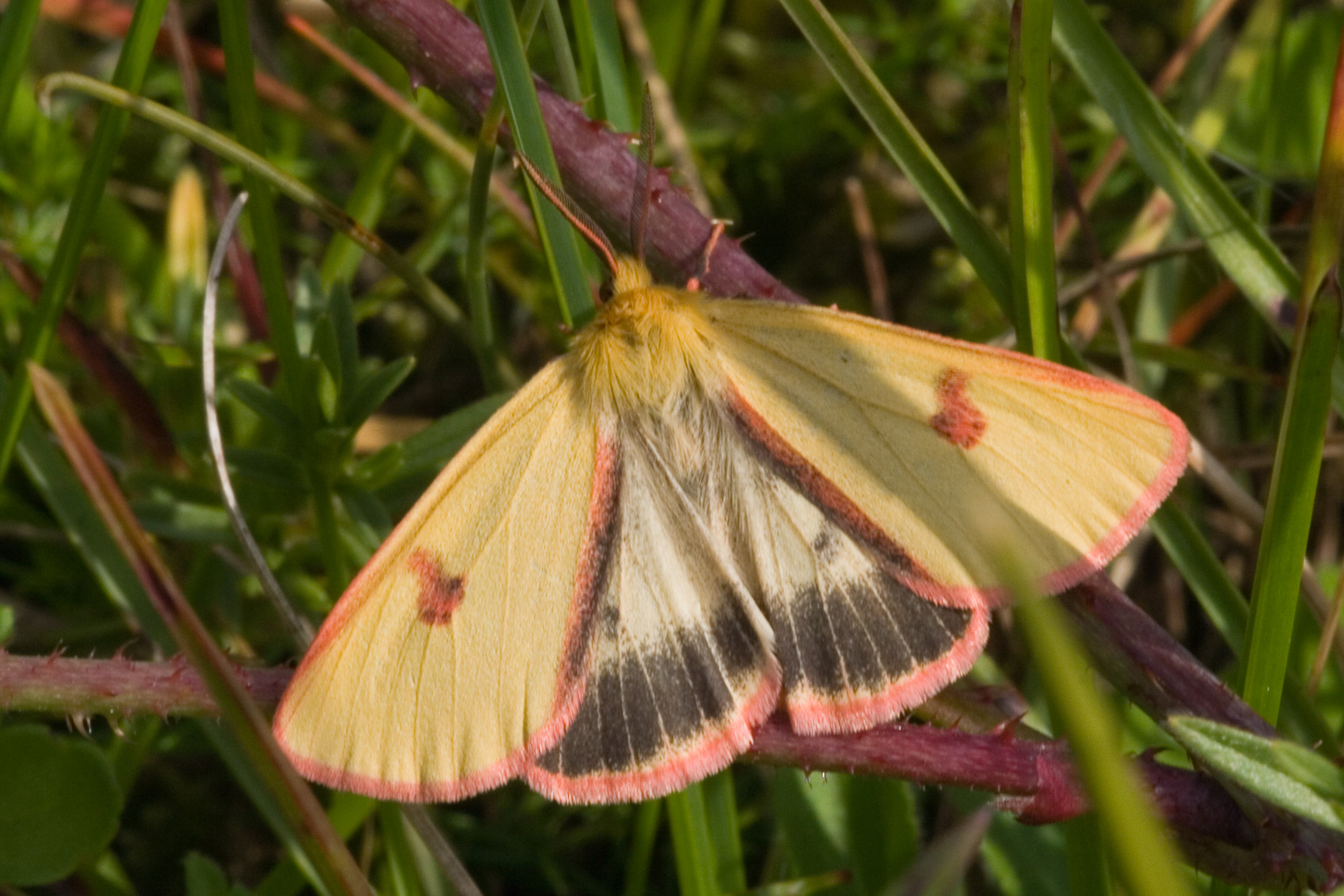 Diacrisia sannio